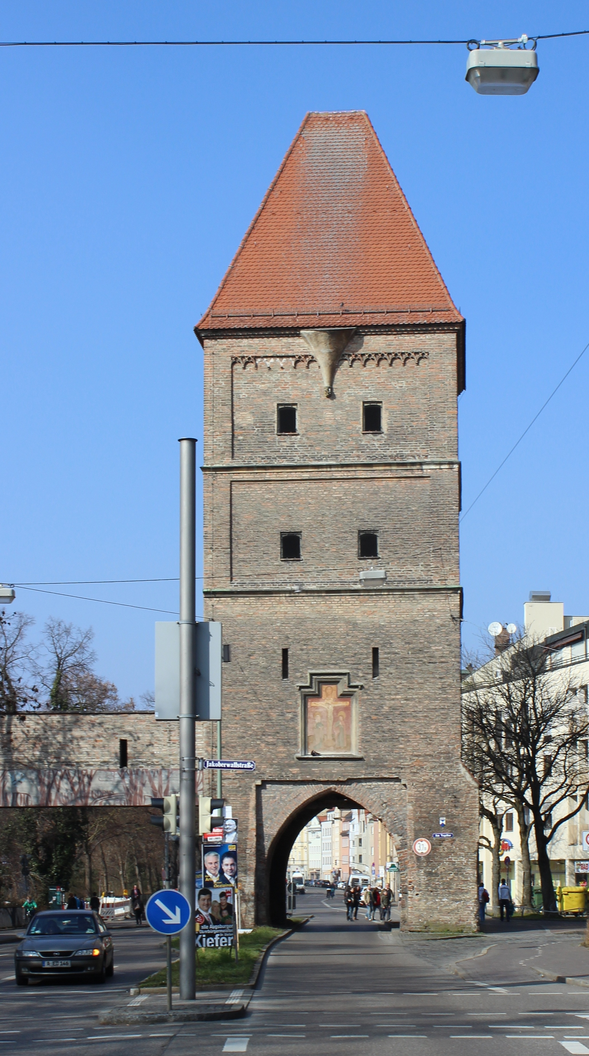 Das Vogeltor der Augsburger Stadtbefestigung